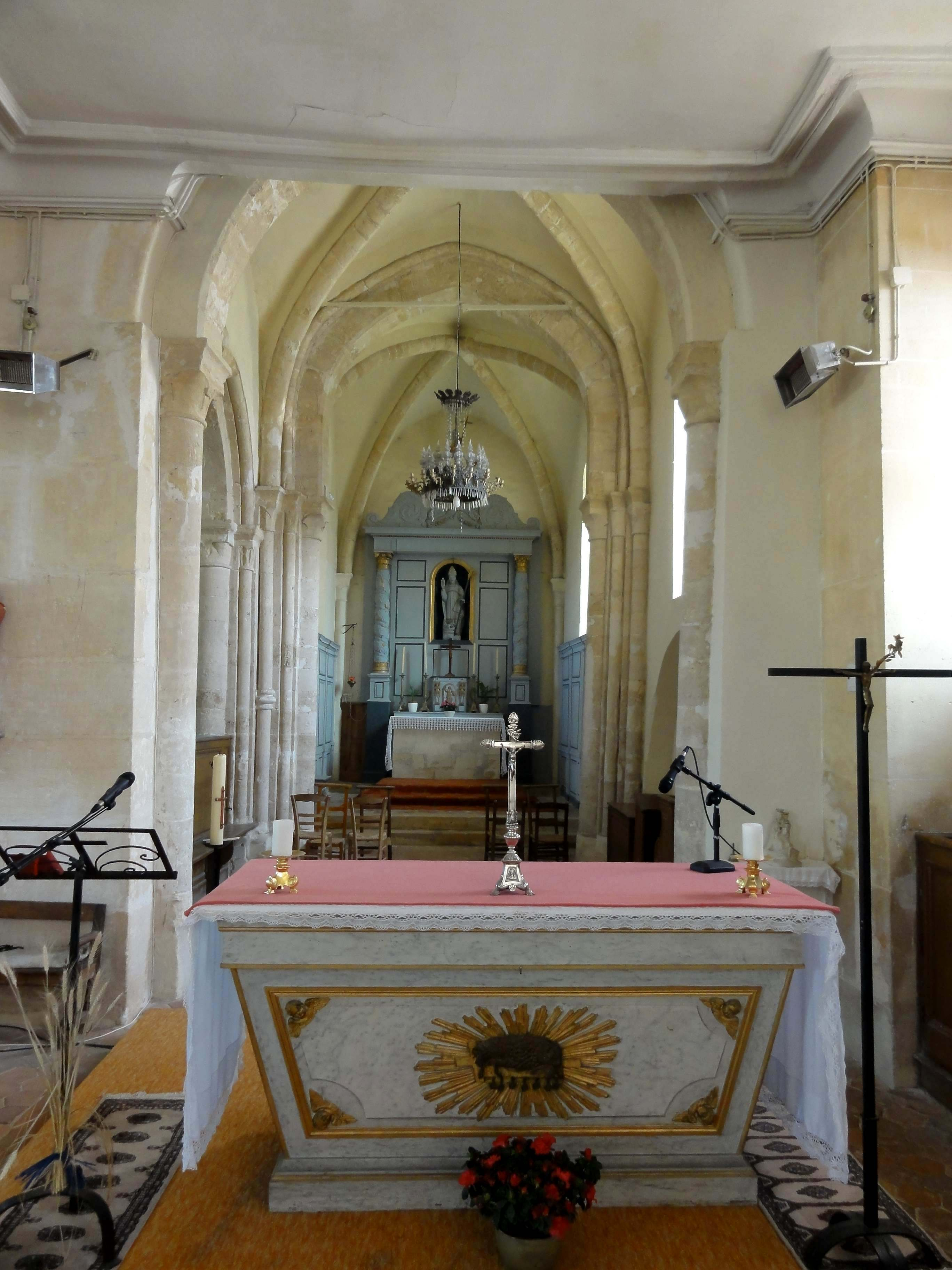 Intérieur de l'église - voir titre.